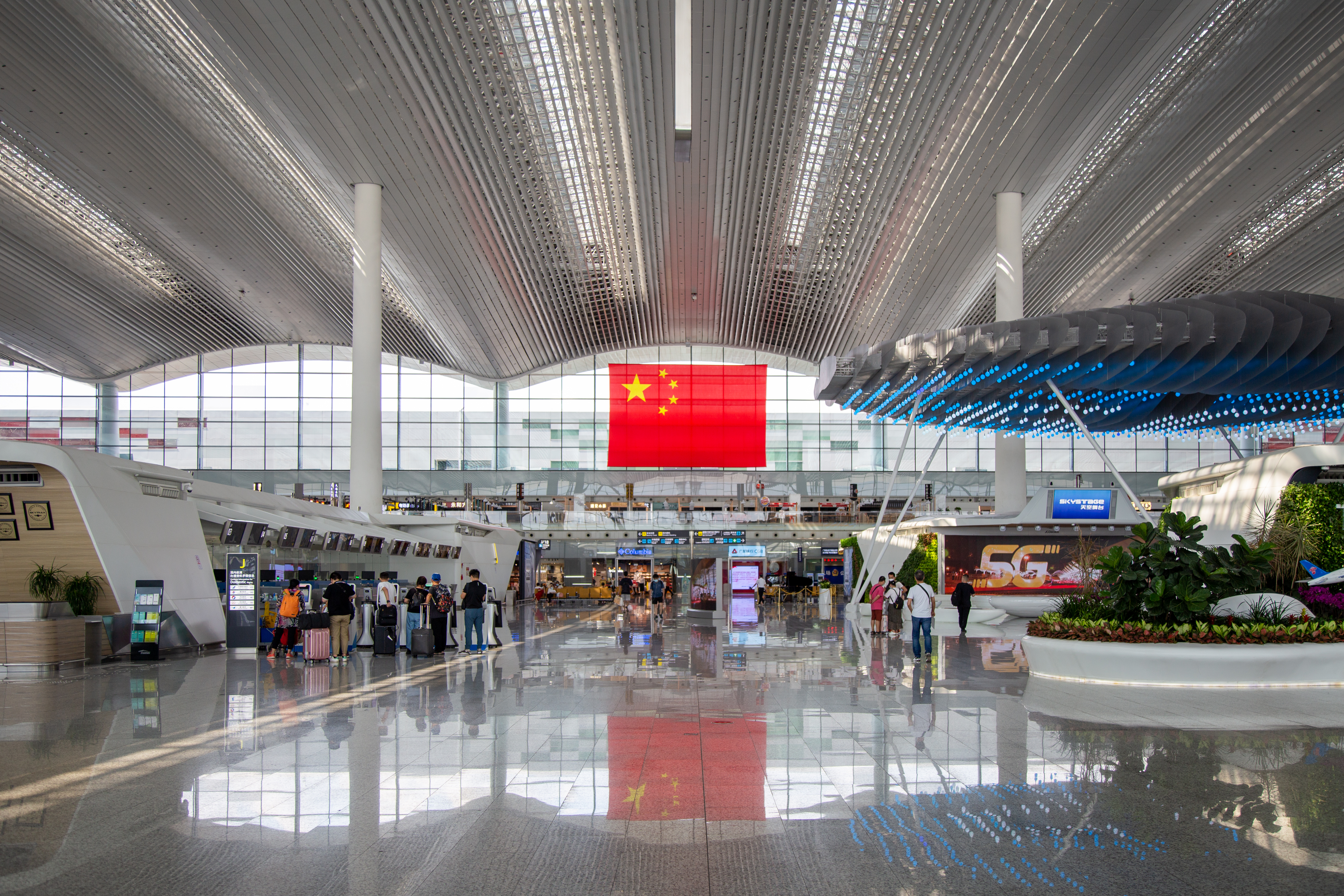 广州白云国际机场二号航站楼出发大厅中庭